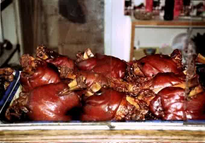 Puli trotters甫里蹄